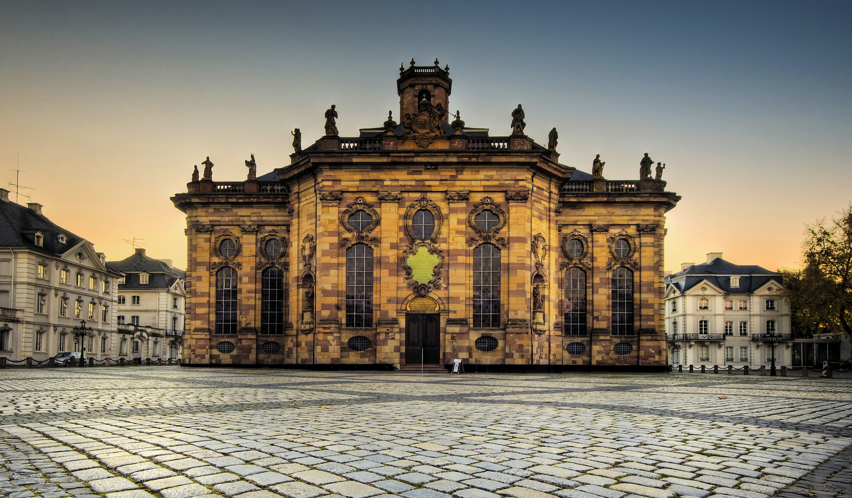 The Ludwigskirche (Ludwig Church) in Saarbrücken.